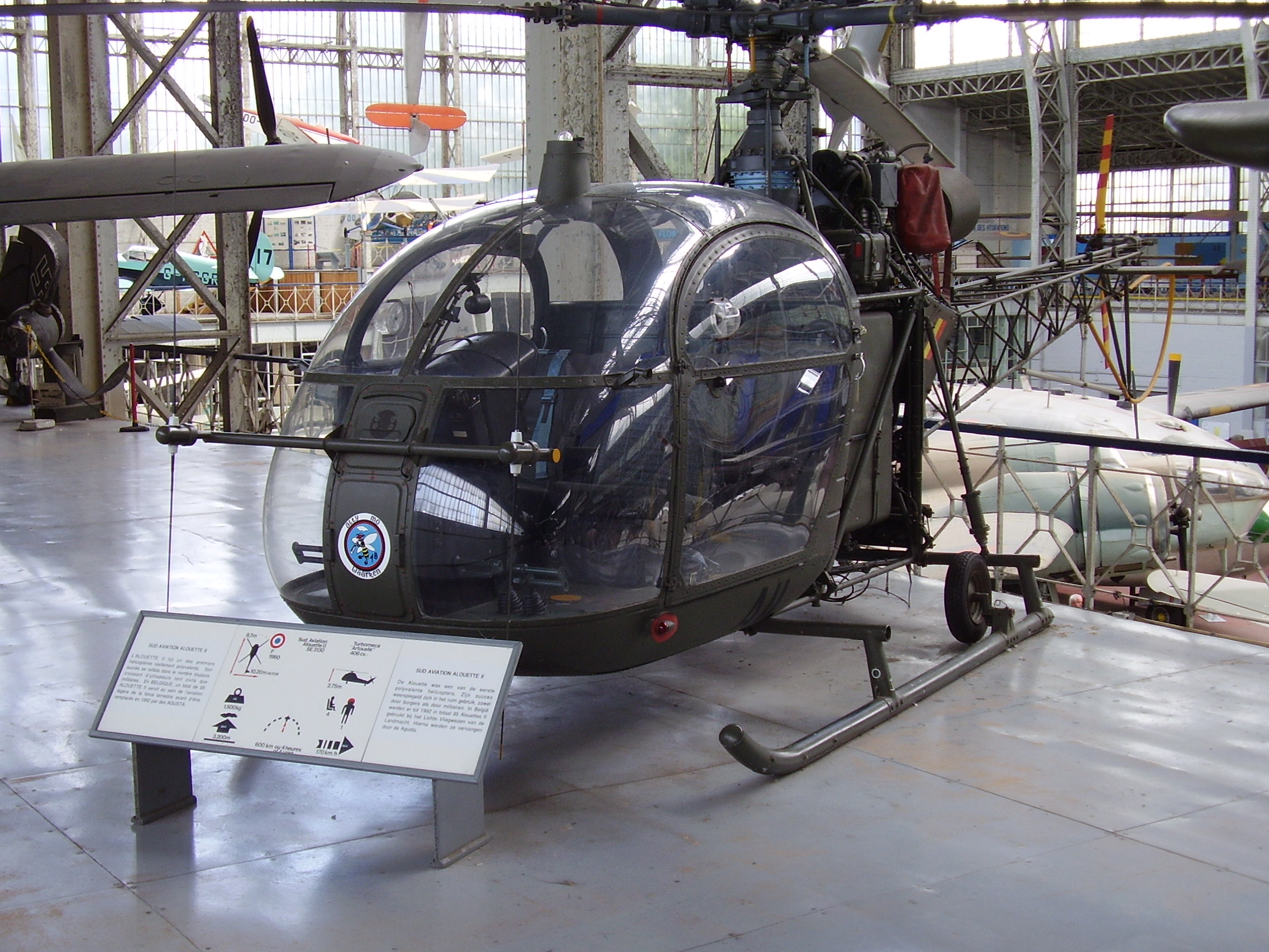 Royal Military Museum Brussels, Musée Royal de l'Armée, Koninklijk Museum van het Leger en de Krijgsgeschiedenis